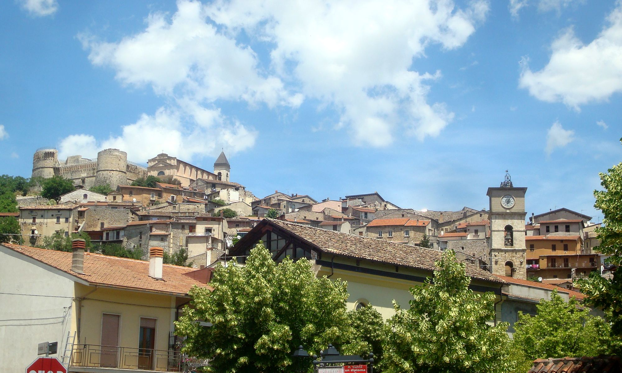 Centro storico del paese con la Rocca Orsini